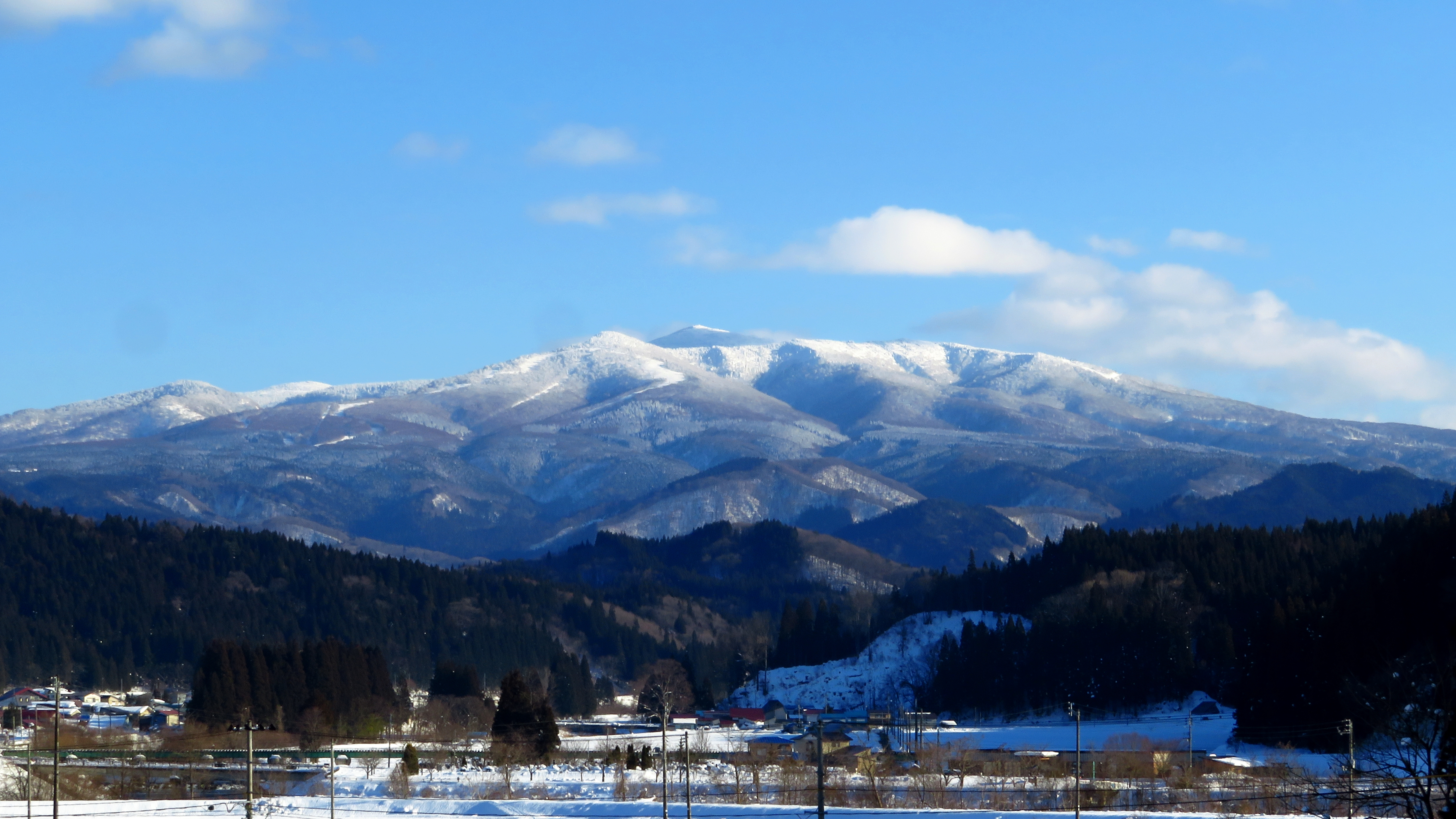 北秋田市阿仁前田から望む森吉山 Canon PowerShot SX720 HS